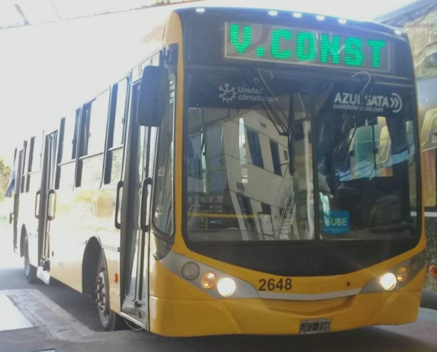 Interno 2648 de Azul Sata, empresa controlada por Rosario Bus. Ésta, presta el servicio de la línea 915.